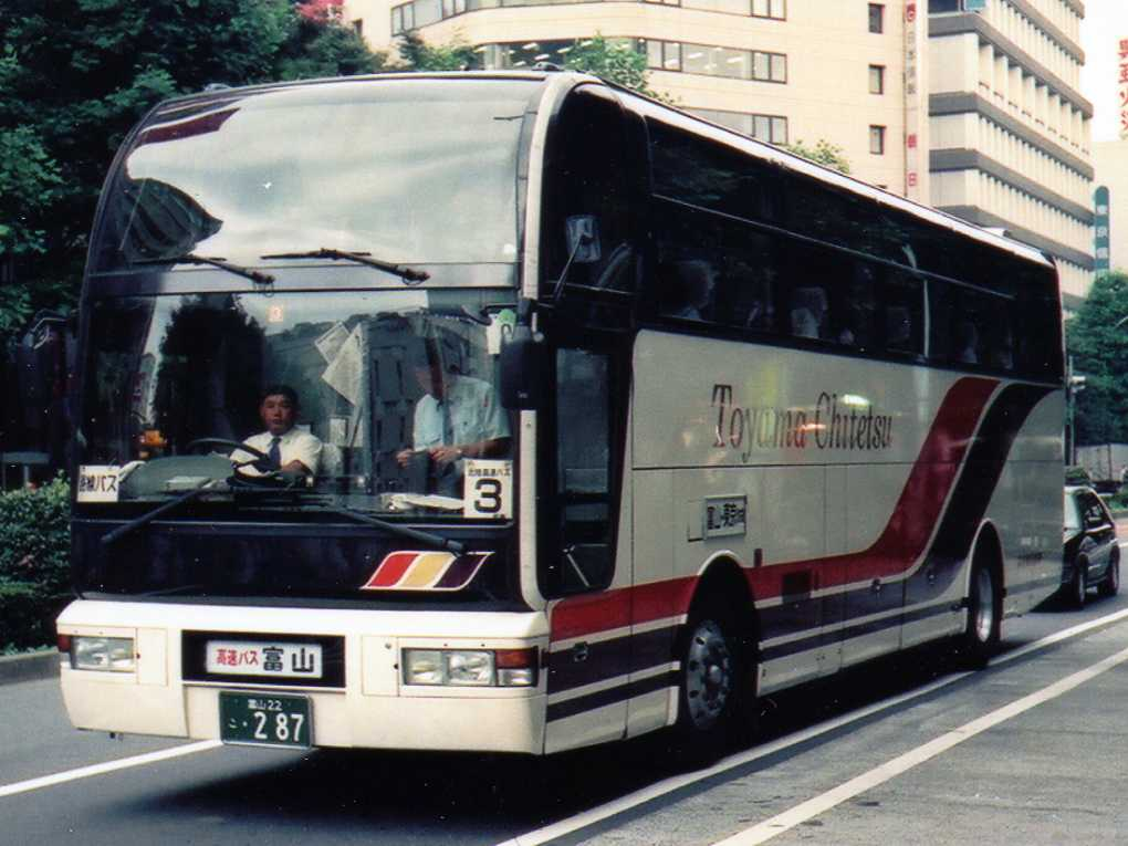 Toyama Chihou Railway Nissan Diesel U-RA530RBN at Ikebukuro Sta.